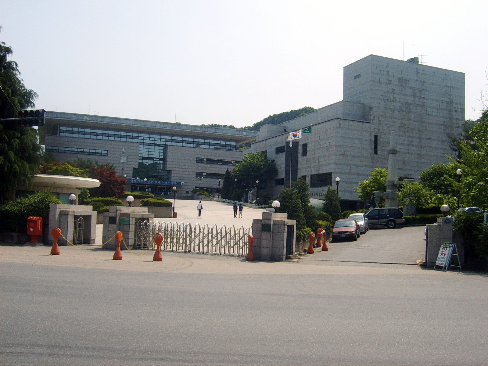 대전한밭도서관의 전경